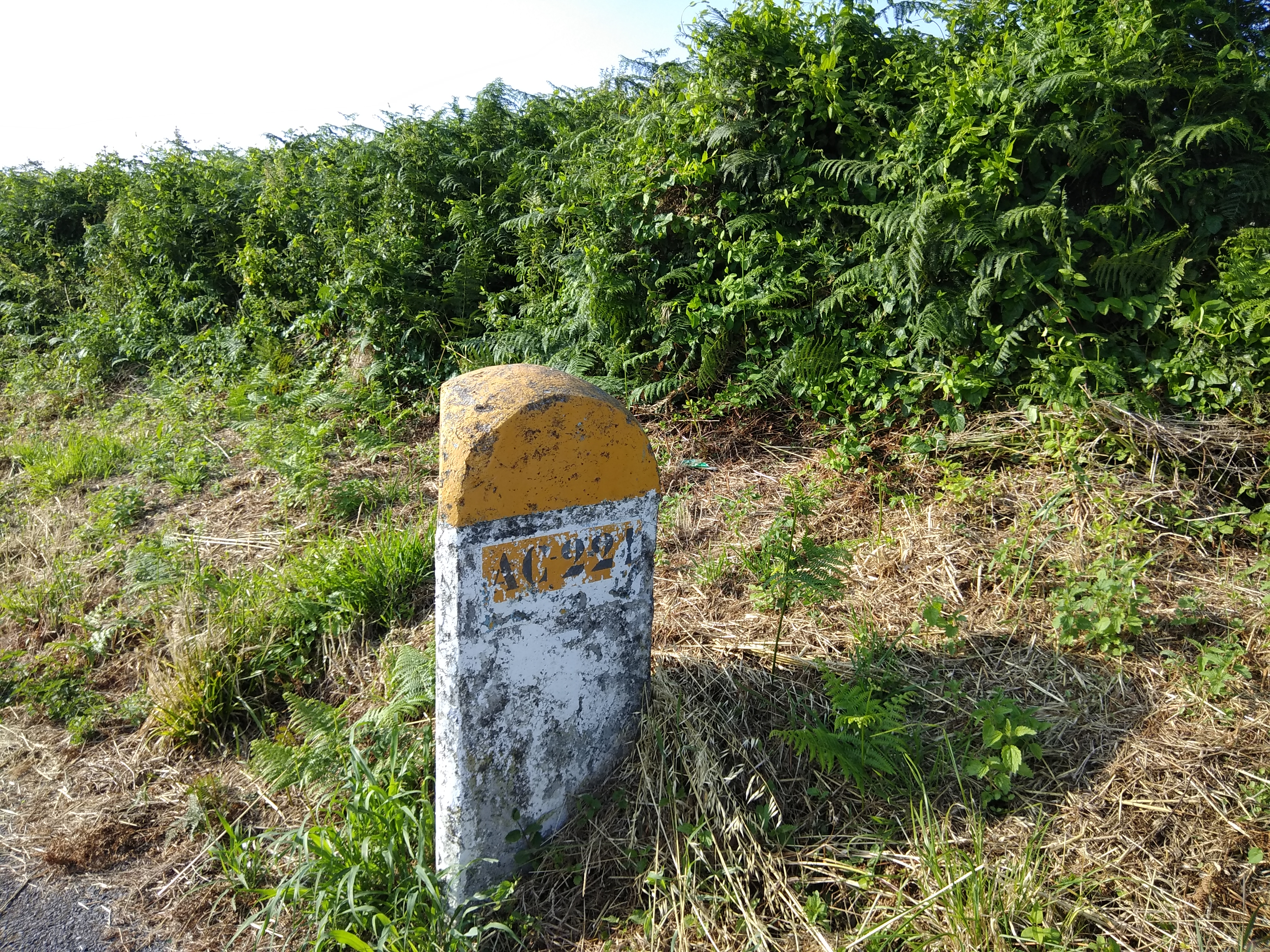 Baliza kilométrica do Plan Peña de 1939 na AC-221, San Pedro de Nós, Oleiros, Galiza.